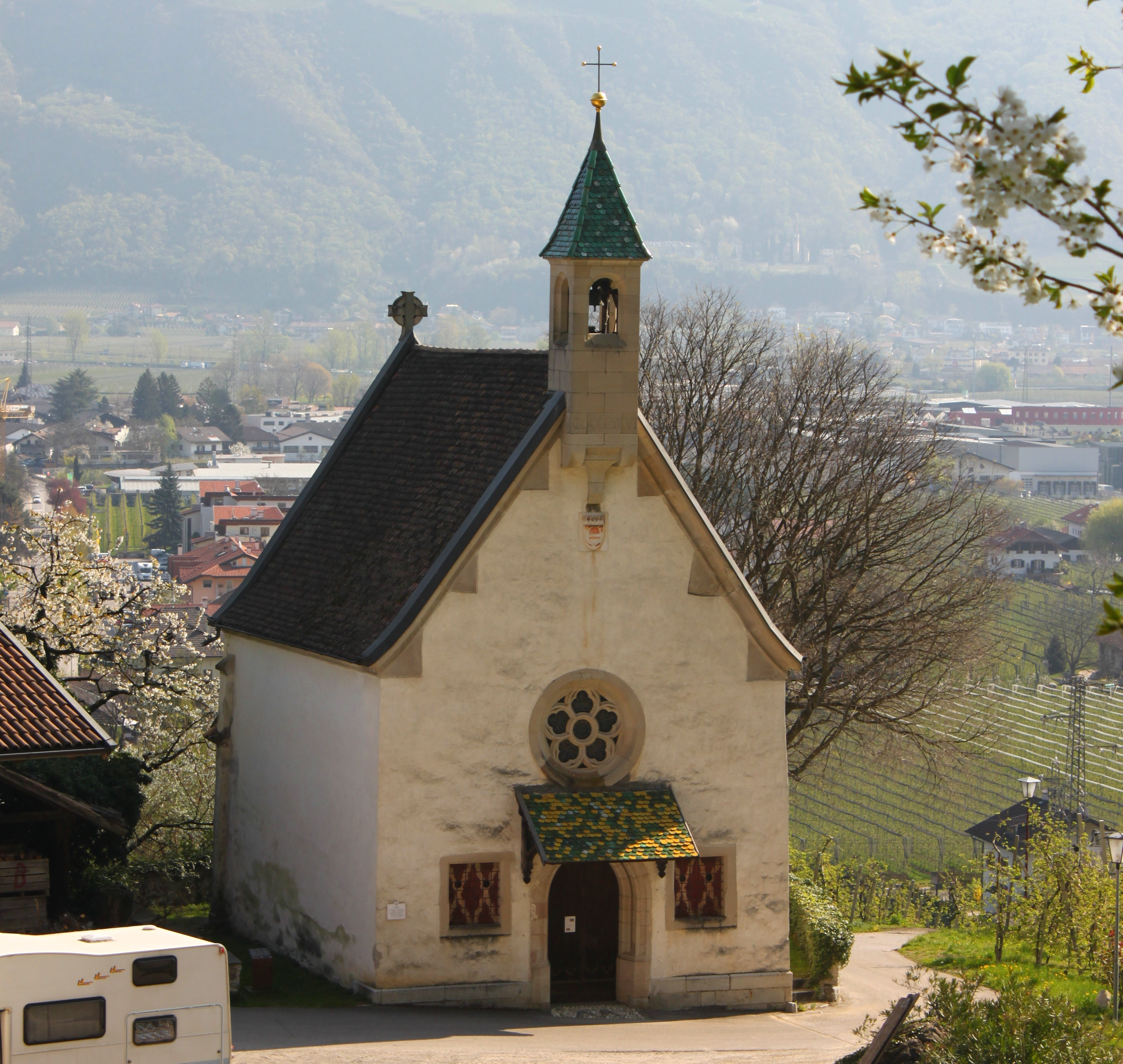 Kapelle St. Margareth in Lana vom Brandis Waalweg aus fotografiert